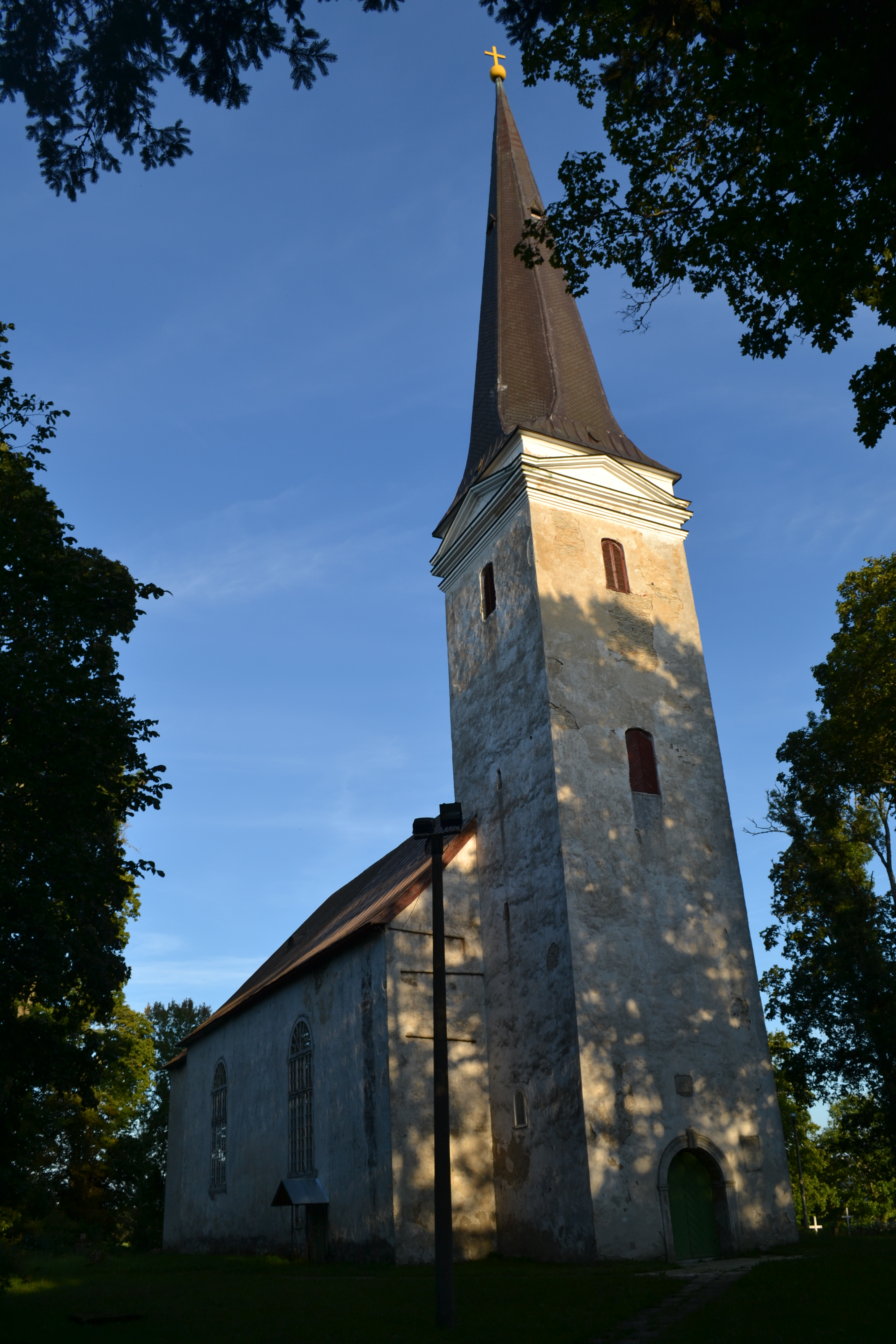 Lääne-Nigula kirik